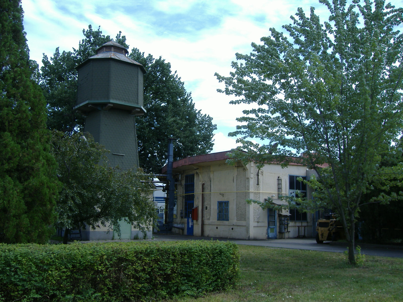 Az Alföldi Kisvasút (Alföldi Első gazdasági Vasút) körfűtőháza és a hozzá tartozó víztorony Békéscsabán az Északi Járműjavító területén.